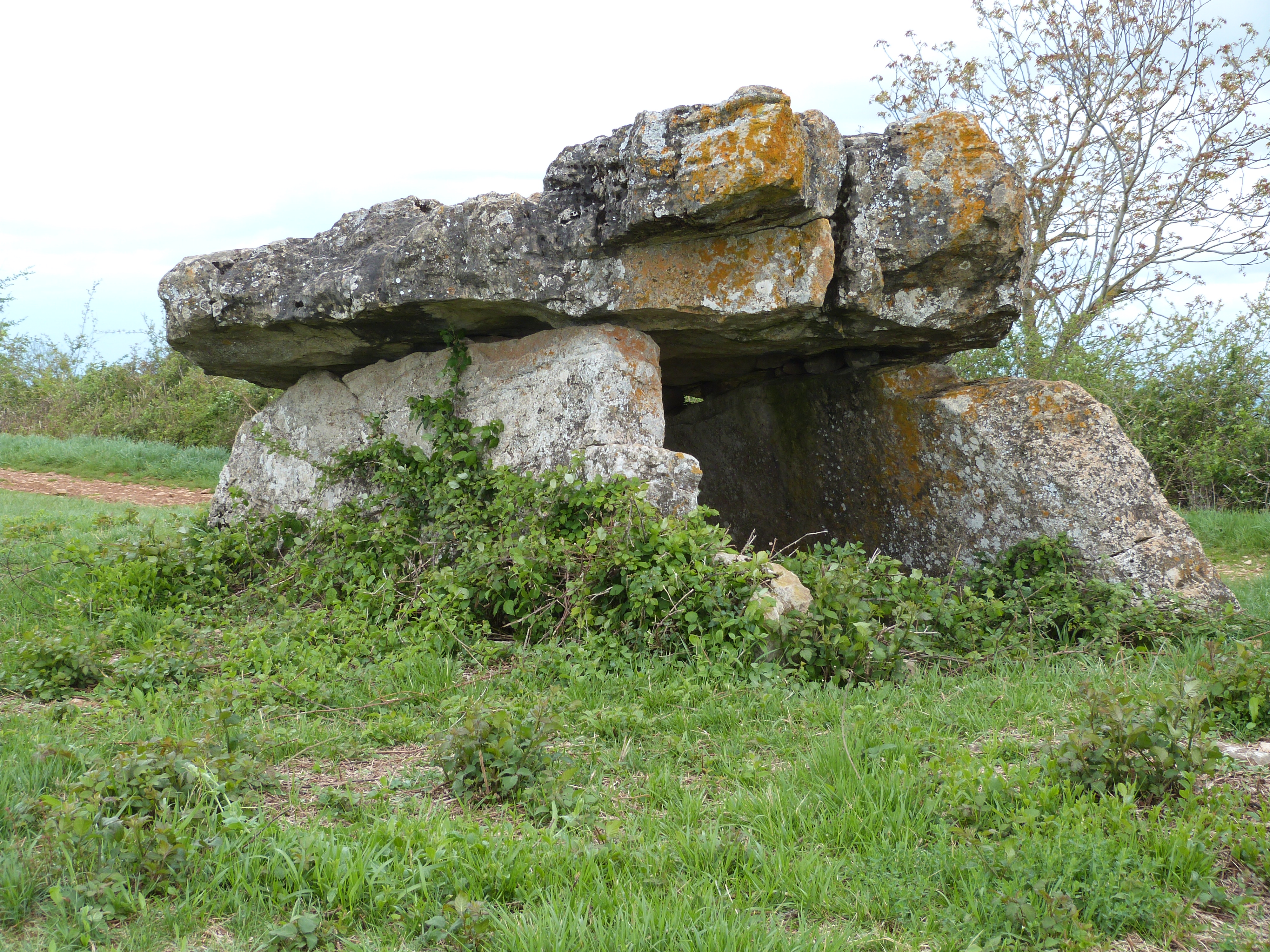 Dolmen de Pérignagol 1